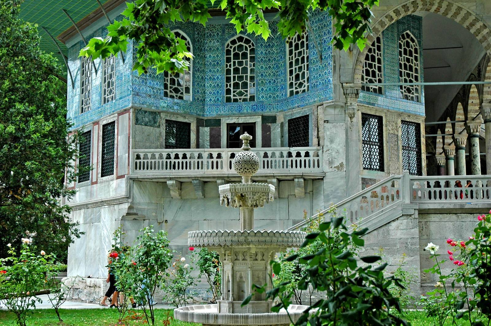 রেভান কিওস্ক(তোপকাপি প্রাসাদ,ইস্তাম্বুল)।